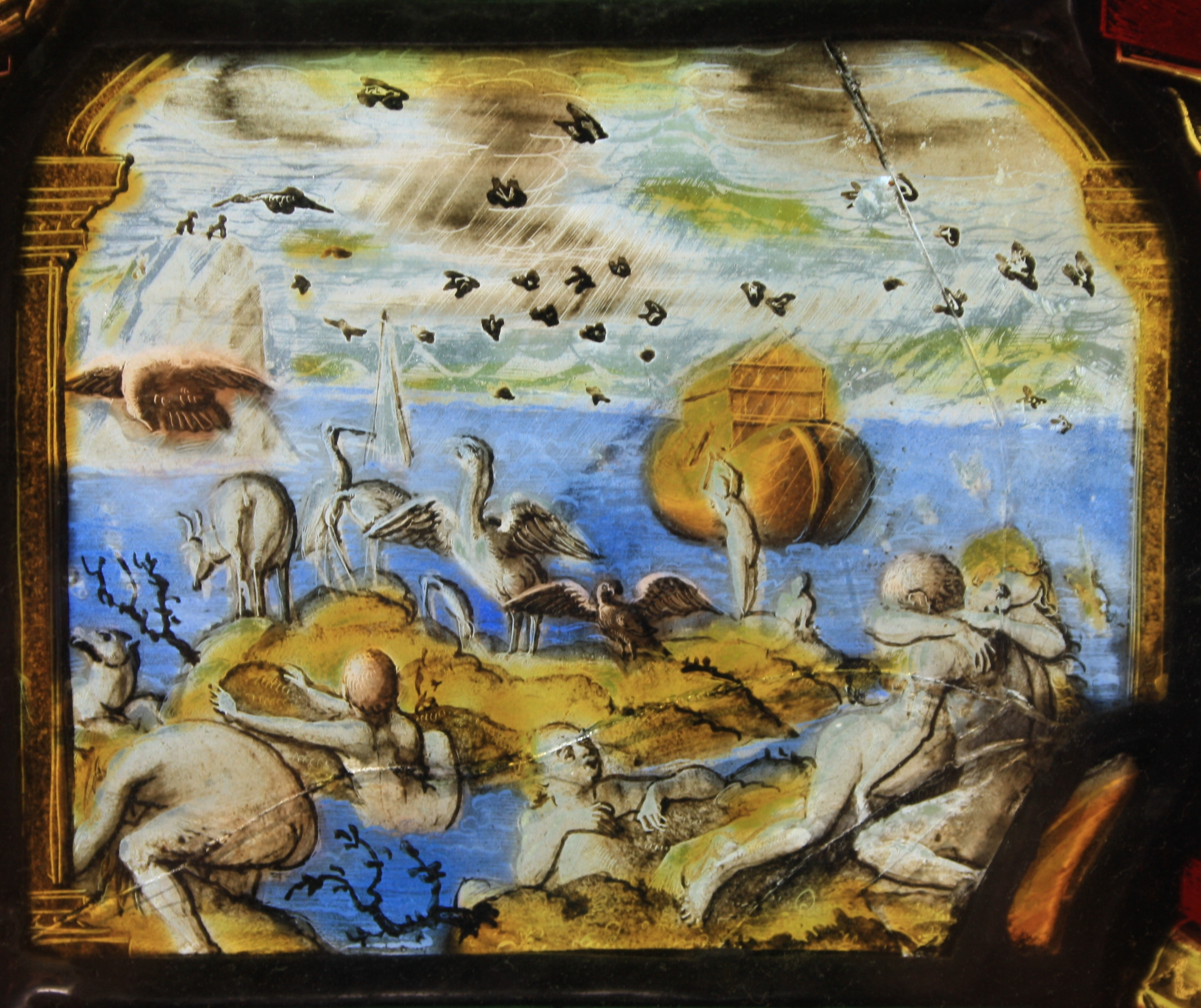 Wappenscheibe im Kreuzgang des Klosters Wettingen: Ostarm, Sortierung von rechts nach links